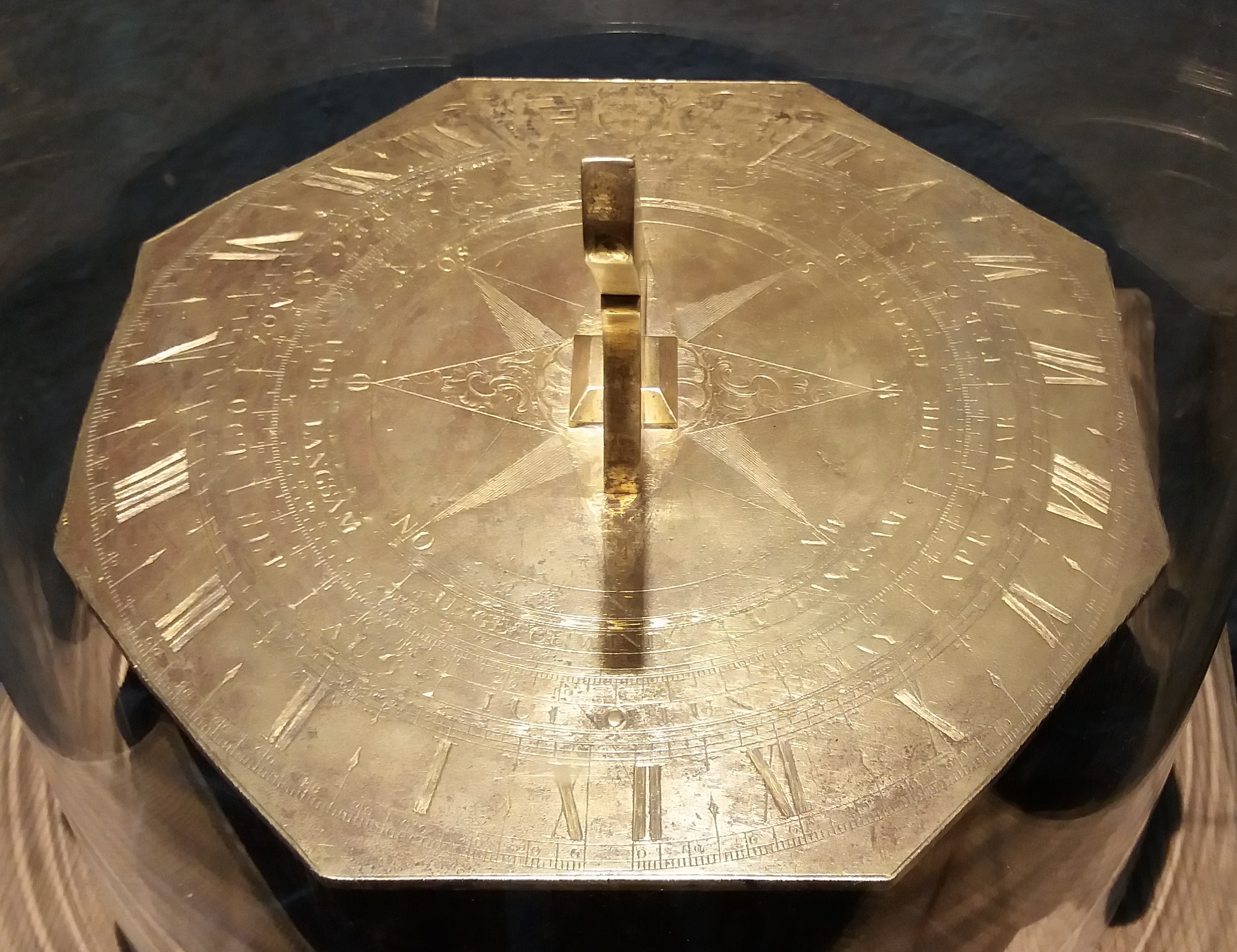 Sonnenuhr aus Messing von Elias Bilgram (1724-1803), ausgestellt im Kirchturm von St. Martin (Memmingen)